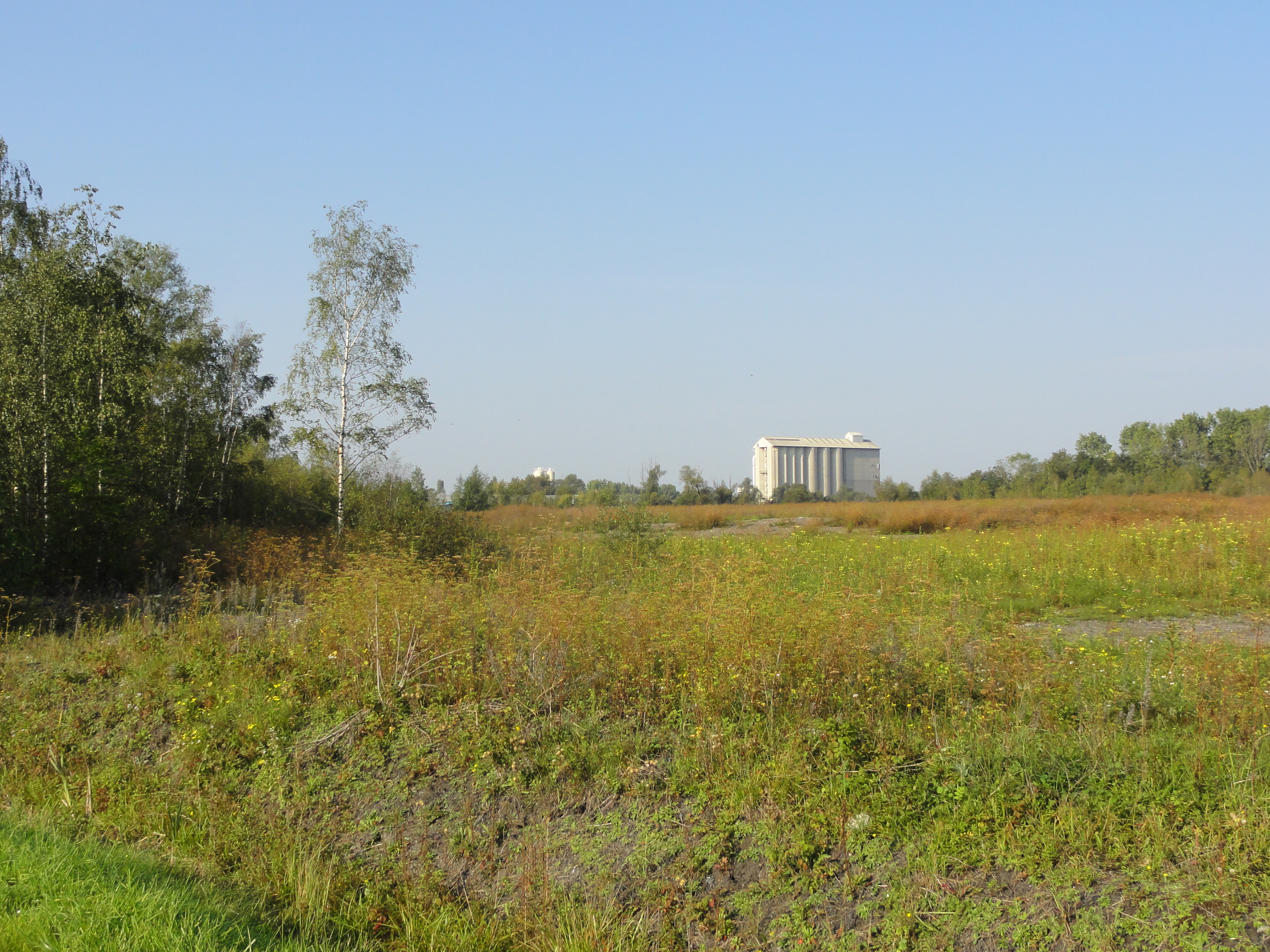 Terril n° 181 dit Cendres sur 180, Centrale de Thiers de la Compagnie des mines d'Anzin, Saint-Saulve, Nord, Nord-Pas-de-Calais, France.